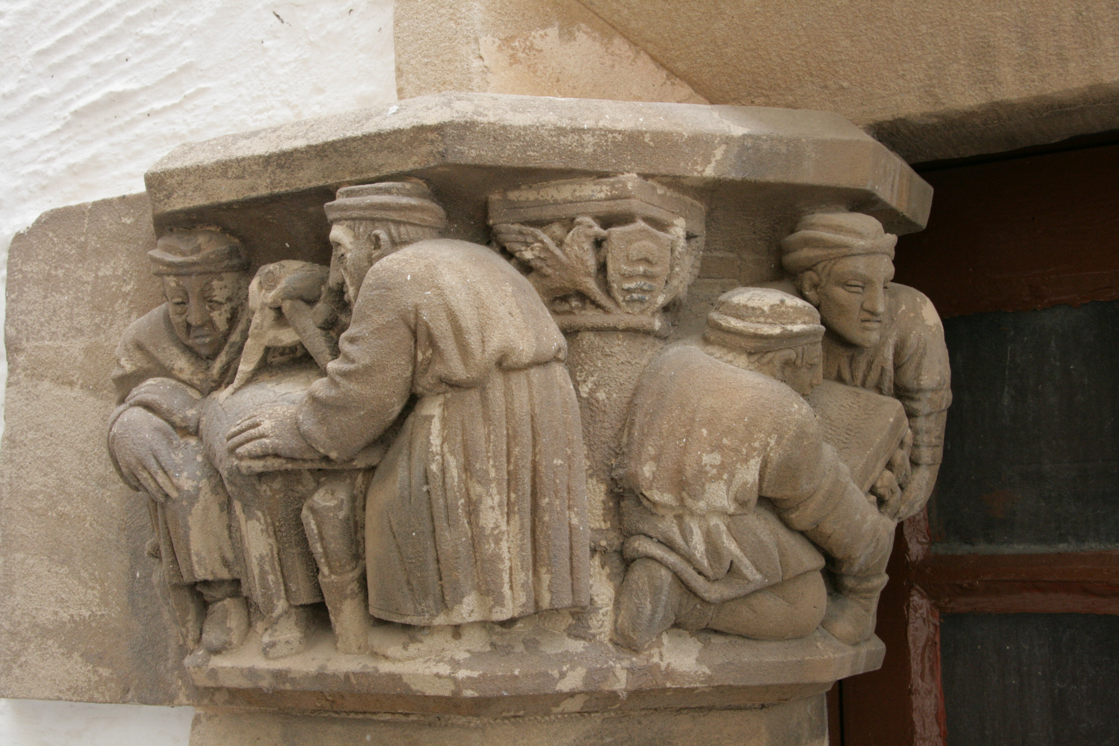 Pere Jou, “Els constructors de Maricel”. Capitell de Maricel, carrer de Fonollar (1918). Fot. Lambert Gràcia. A l’esquerra, Charles Deering mirant com Miquel Utrillo traça els plànols de l’edifici. Enmig, l’escut de Maricel dissenyat per Utrillo.